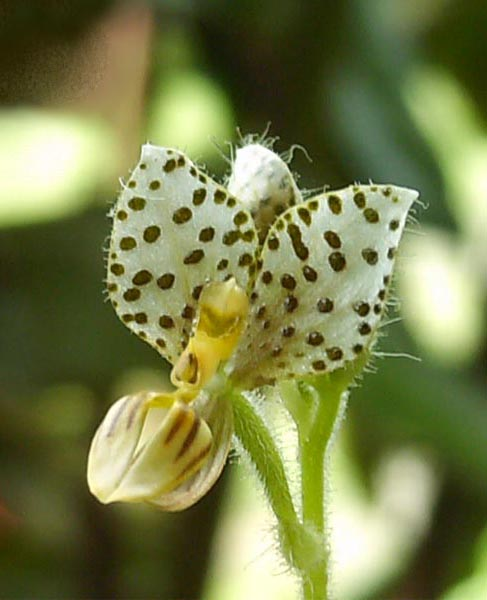 Ponthieva maculata, flower. Merida, Venezuela